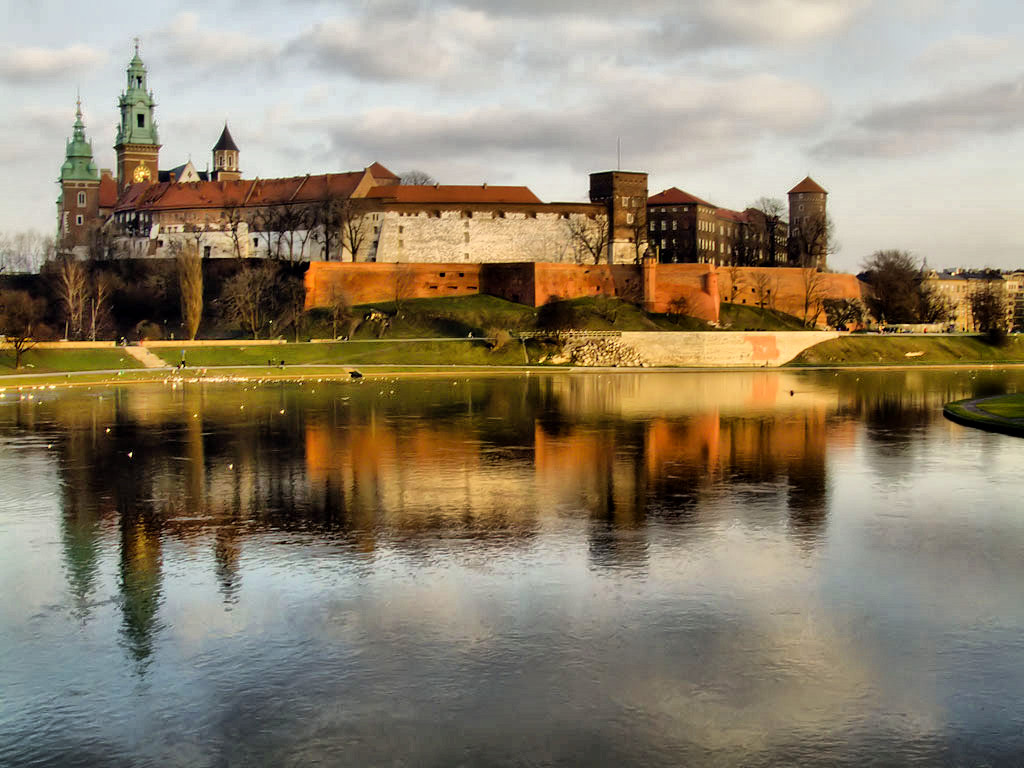 Widok na Wawel z Mostu Dębnickiego (02.02.2007)